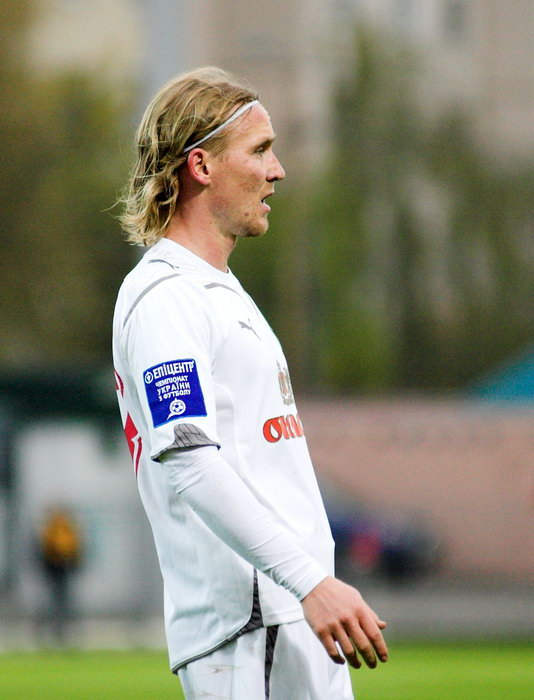 Ринар Салаватович Валеев — украинский футболист.